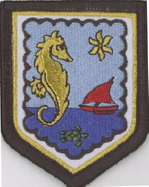 Ecusson d'épaule Mayotte.